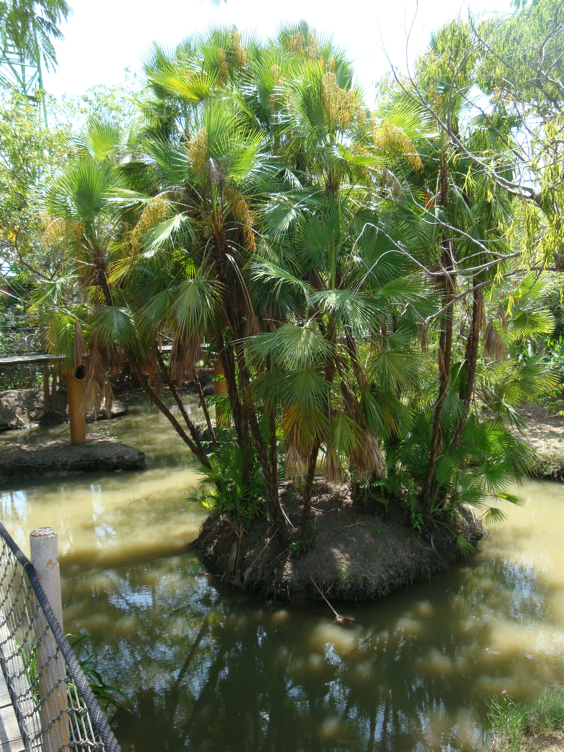 Palma de Tasiste, en la Reserva de la Biosfera "Pantanos de Centla", municipio de Centla, Tabasco, México.